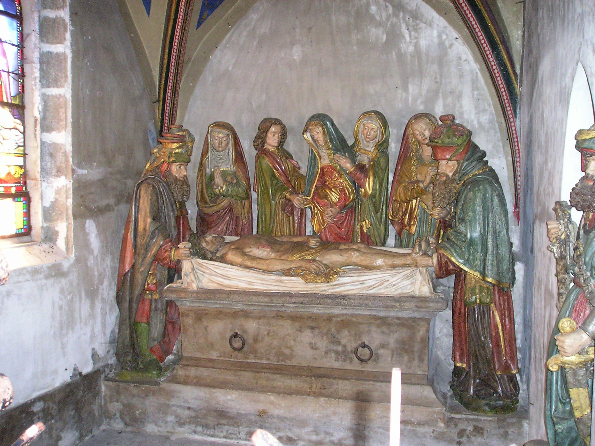 Salers_Saint_Mathieu_Grablegung_Christi_Kunstwerk_von_1495